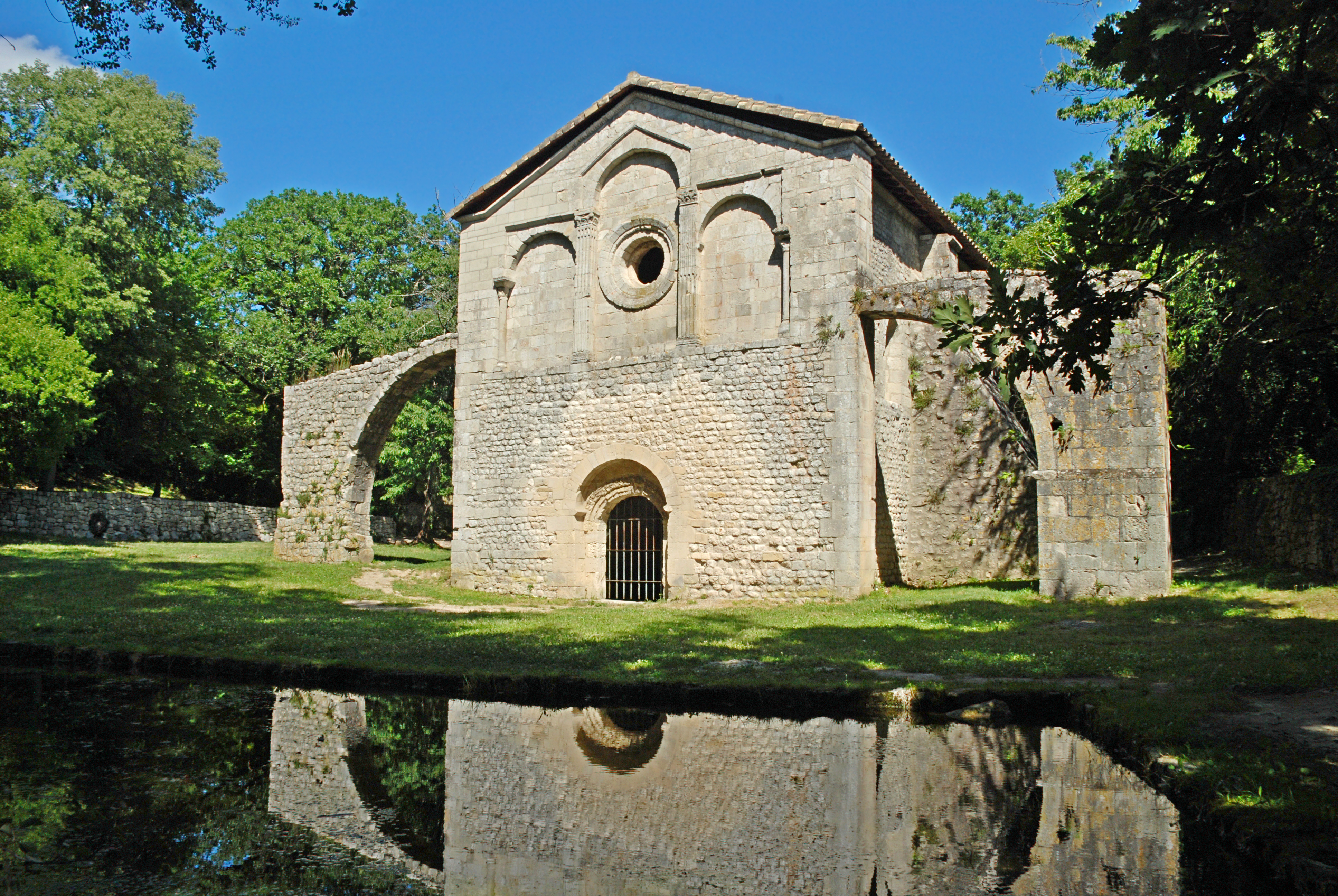 France - Drôme - La Garde-Adhémar - prieuré bénédictin du Val des Nymphes